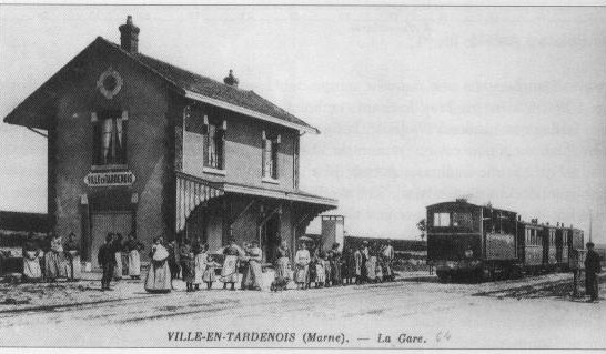 Ville_en_Tardenois, la gare et son bâtiment voyageurs_type_1b.